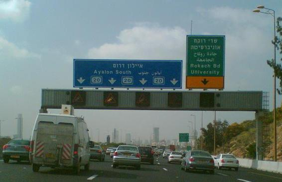 נתיבי אילון. צילם דוד שי.